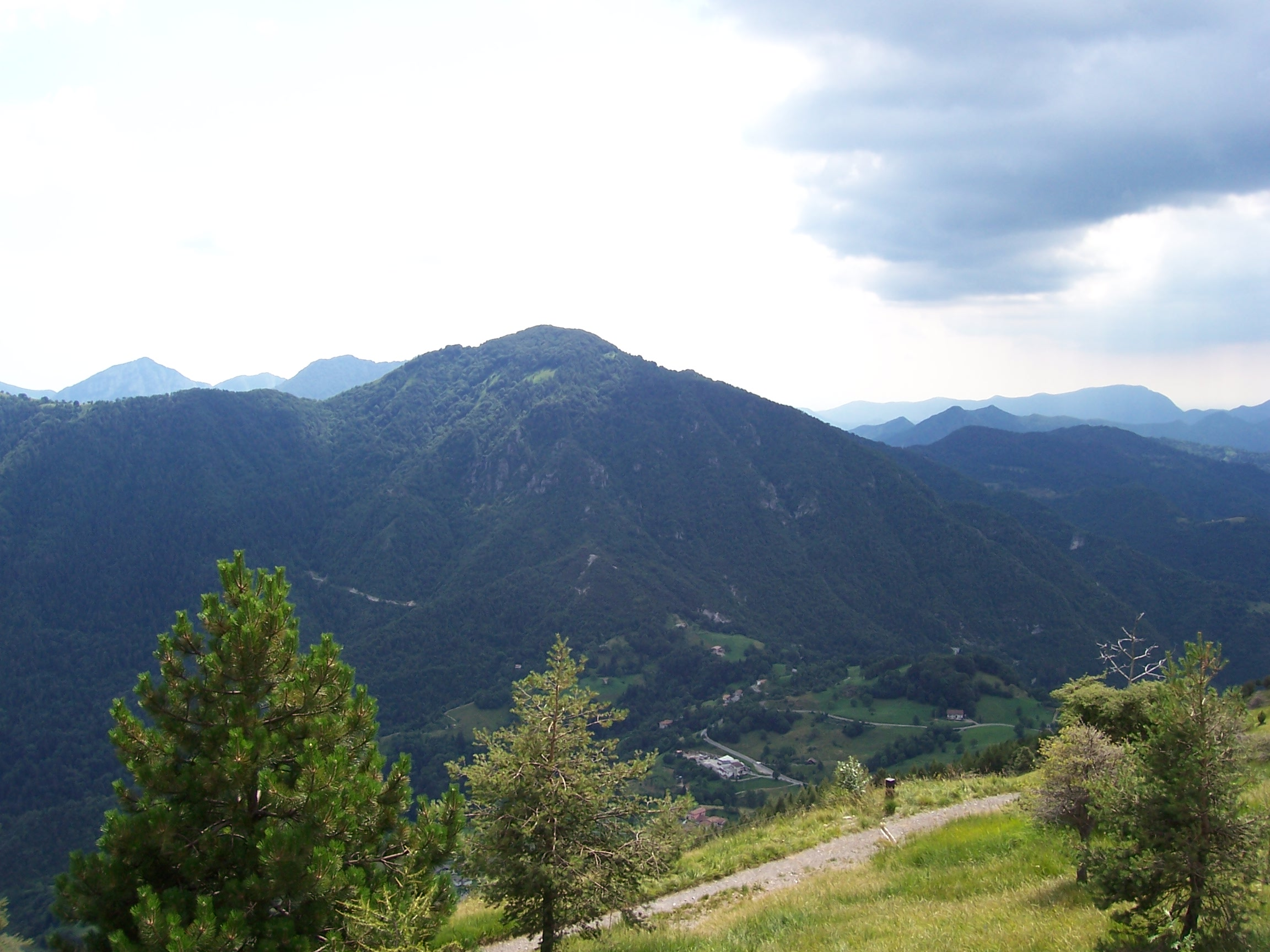 Il Monte Manos a Capovalle (Brescia)